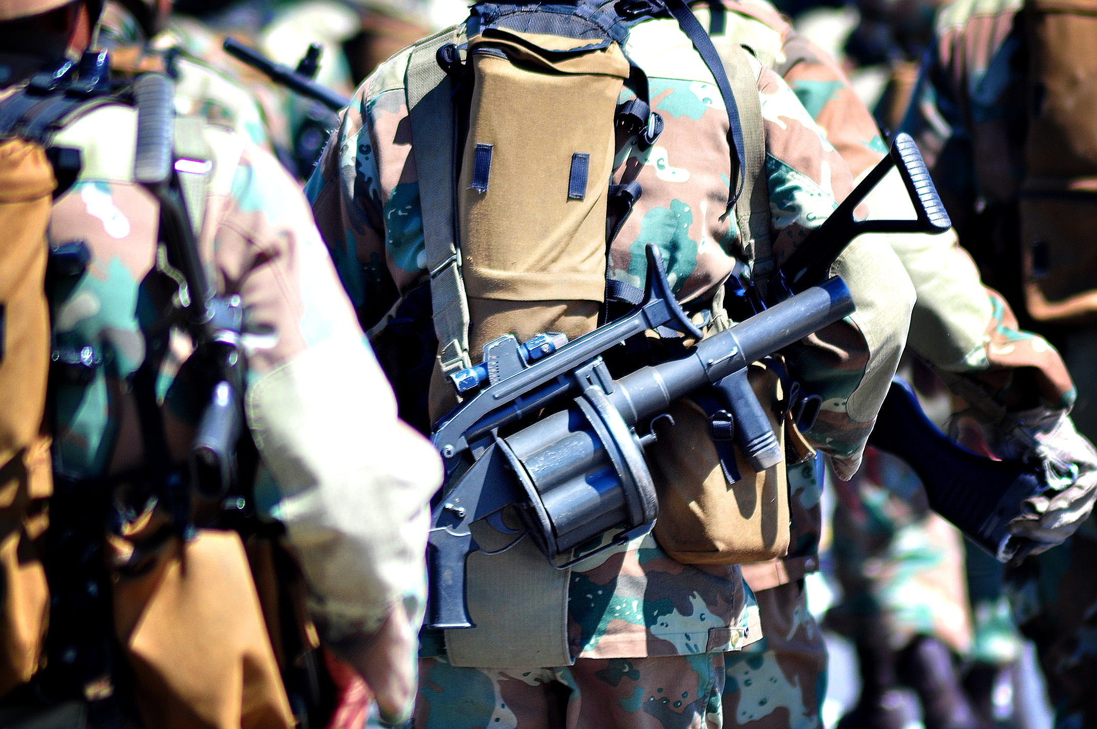 Soldiers at AAD 2010